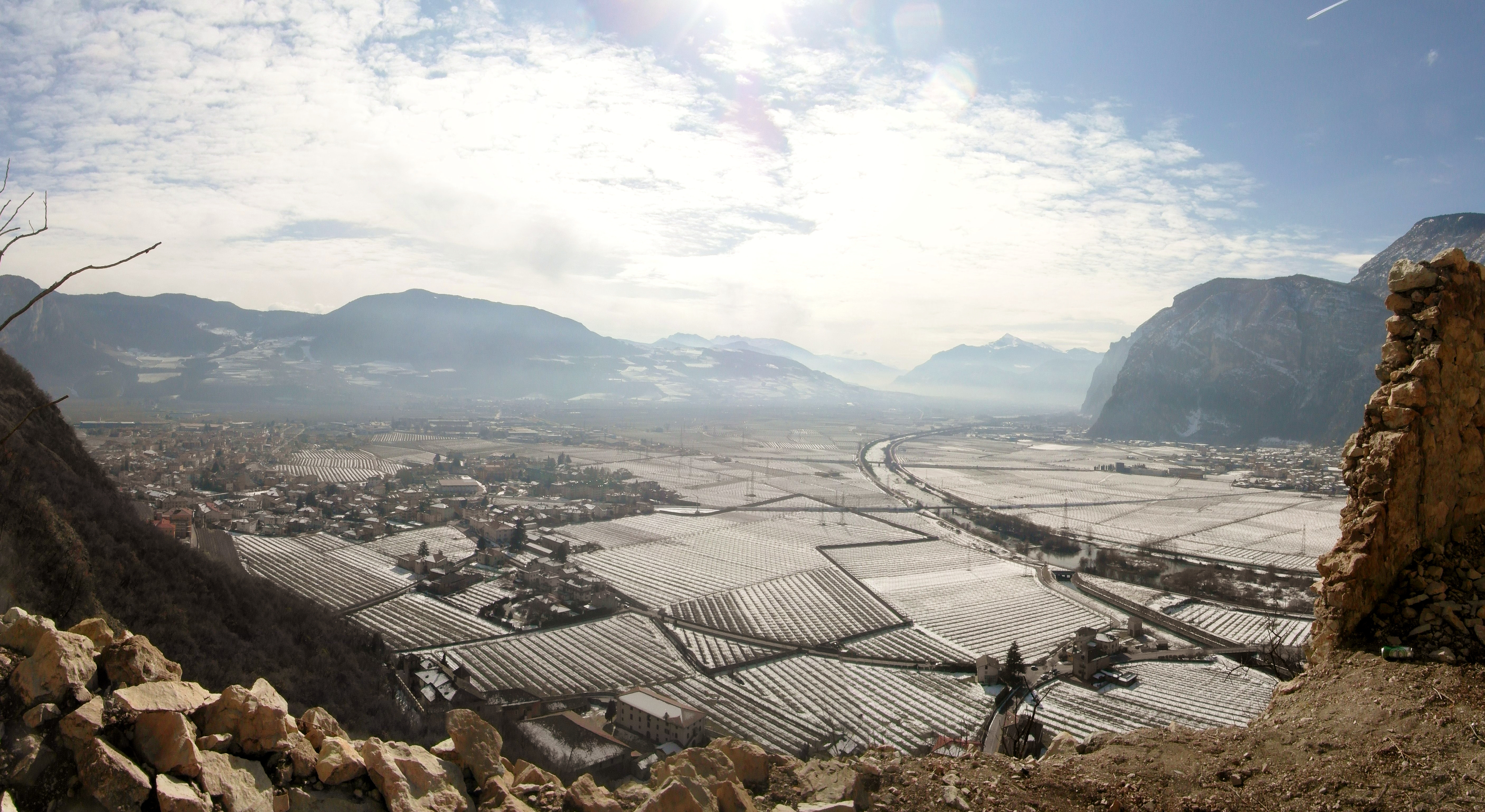 Panorama della Piana Rotaliana e del Monte Bondone dal Castel San Gottardo